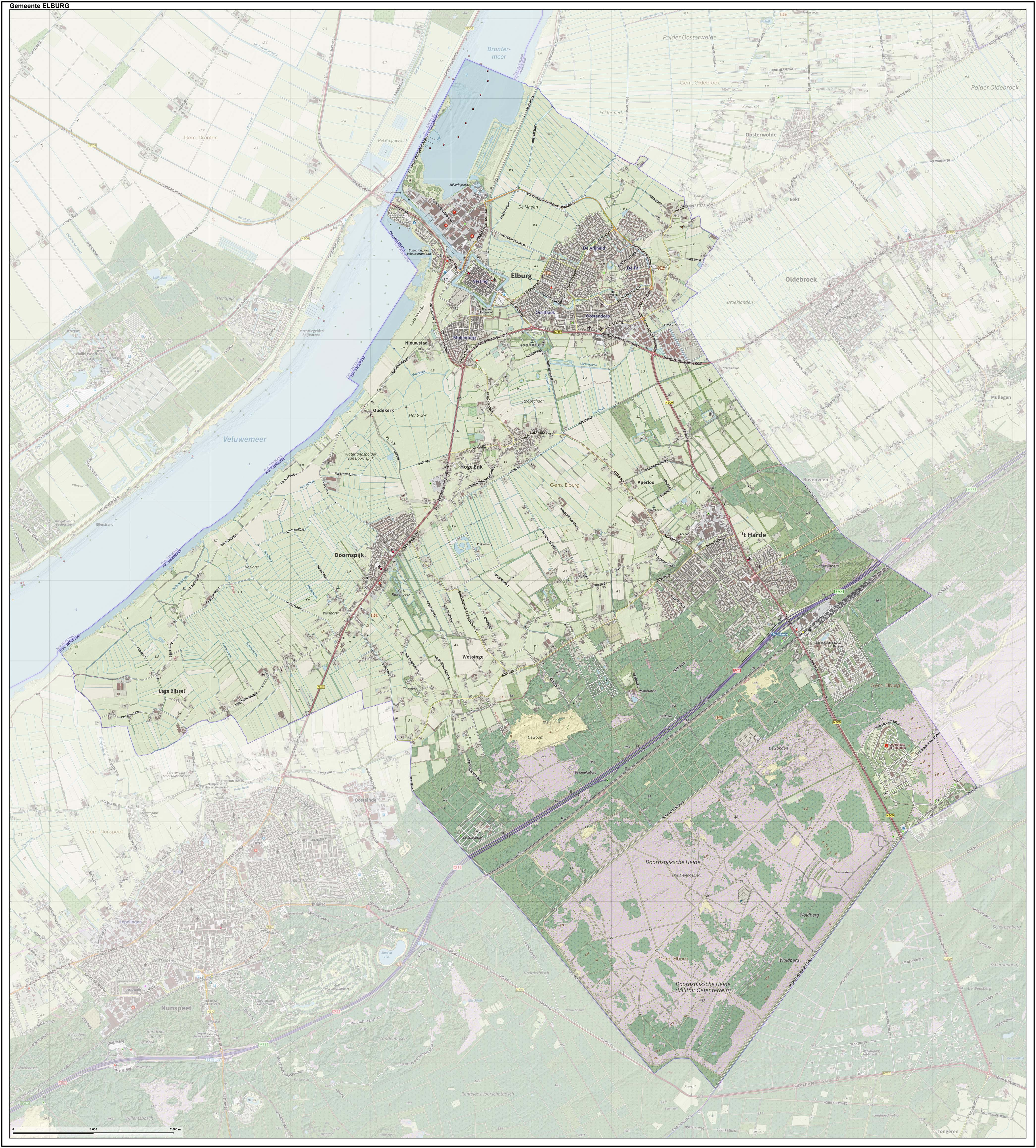 Topografische gemeentekaart. Resolutie: 400 pixels/km. Kaartbeeld samengesteld uit de open geodata van de Top10NL en Top25namen (Kadaster), Creative Commons-BY licentie. Gebouwvlakken uit open geodata BAG extract. Wegen uit de OpenStreetMap, OpenStreetMap community. Reliëfschaduw uit de Actuele Hoogtekaart AHN2. Samenstelling en kleurenschema: Jan-Willem van Aalst, met QGIS. Zie ook de Legenda.